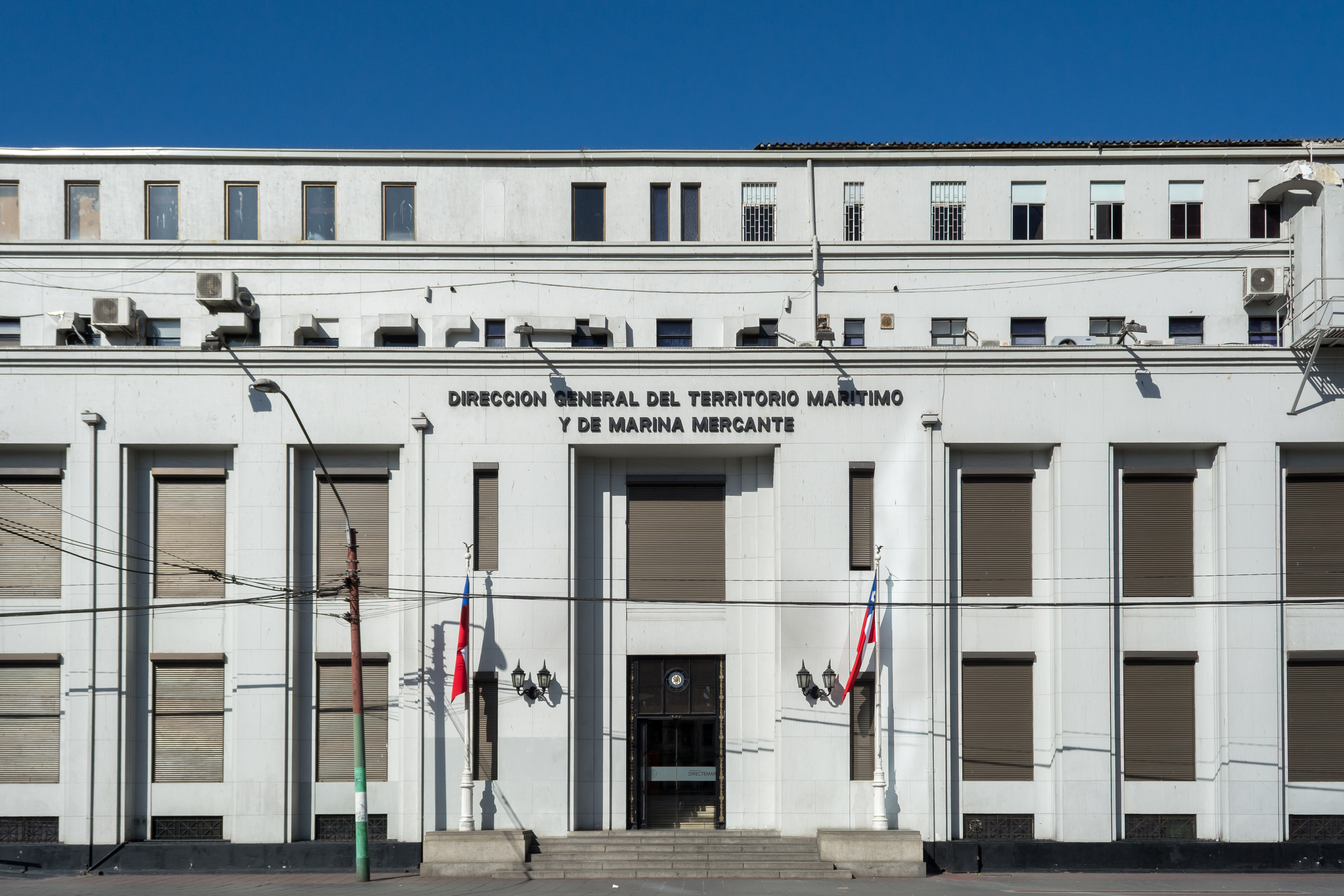 Dirección General del Territorio Marítimo y Marina Mercante, Valparaíso, Región de Valparaíso, Chile